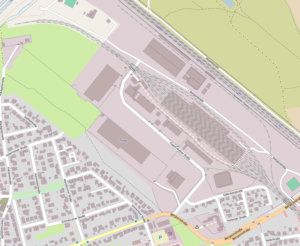 Karte / ungefährer Gleisplan des Bahnbetriebswerk München Nord This map may be incomplete, and may contain errors. Don't rely solely on it for navigation.